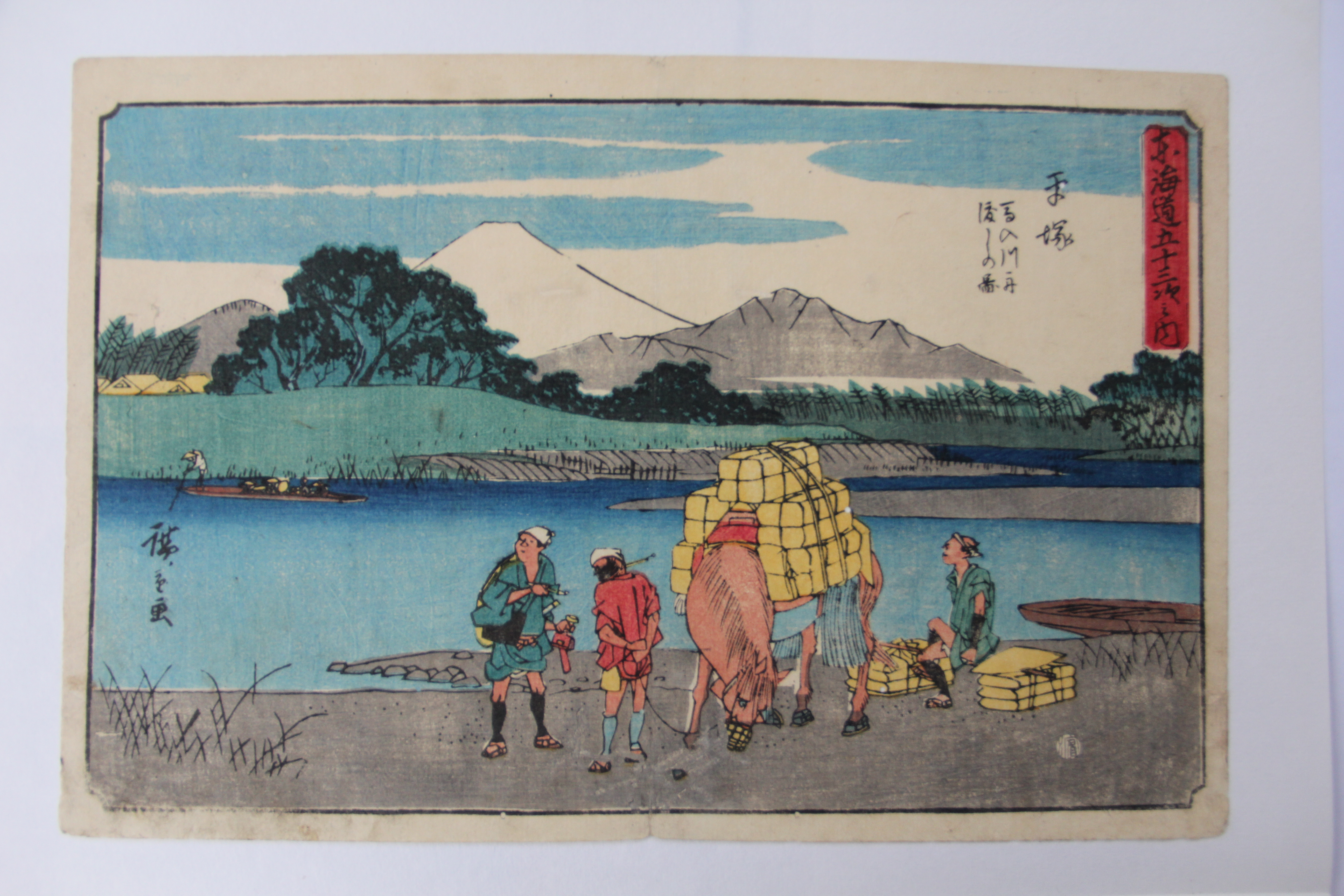 広重画『東海道五十三次之内（行書東海道）平塚 馬入川舟渡の圖』